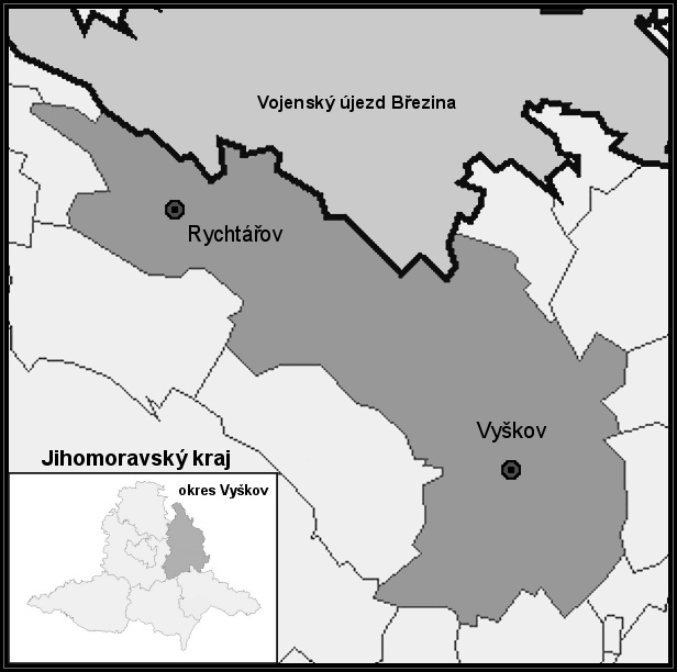 Výřez Rychtářov (Vyškov - czech republic)